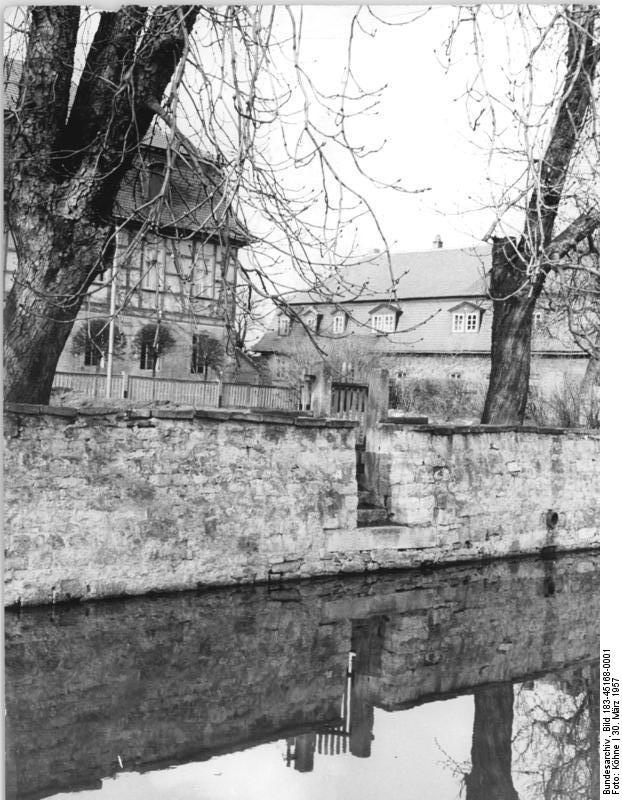 Allmenhausen, Gebäude des VEG Zentralbild Köhne Weiß-Qu 30.3.1957 Aus der Arbeit im VEG Allmenhausen Krs. Sondershausen Das Volkseigene Gut Allmenhausen, ein ehemaliger Herrensitz, der zuletzt in dern Händen der Großgrundbesitzers Rittmeister Reisicht war, umfasst einschliesslich des Betriebsteiles Poukendorf eine landwirtschaftliche Nutzfläche von 431, 19 ha. Früher als sonst begann auch hier die Frühjahrsbestellung, Die Hauptaufgabe des VEG Allmshausen besteht in der Saatgutvermehrung. Darüber hinaus widmet sich dieser Bertieb sehr intensiv der Viehwirtschaft und betreibt besonders die Zucht deutscher Edelschweine. Um den landwirtschaftlichen Nachwuchs zu sichern, lernen hier 32 Lehrlinge , die in einem Internat untergebracht sind, und für die nach Abschluß der zweijährigen Lehrzeit der Besuch von Fachschulen vorgesehen ist. UBz: Teilansicht des Gebäudekomplexes des VEG Allmenhausen von der Pferdeschwemme aus gesehen.